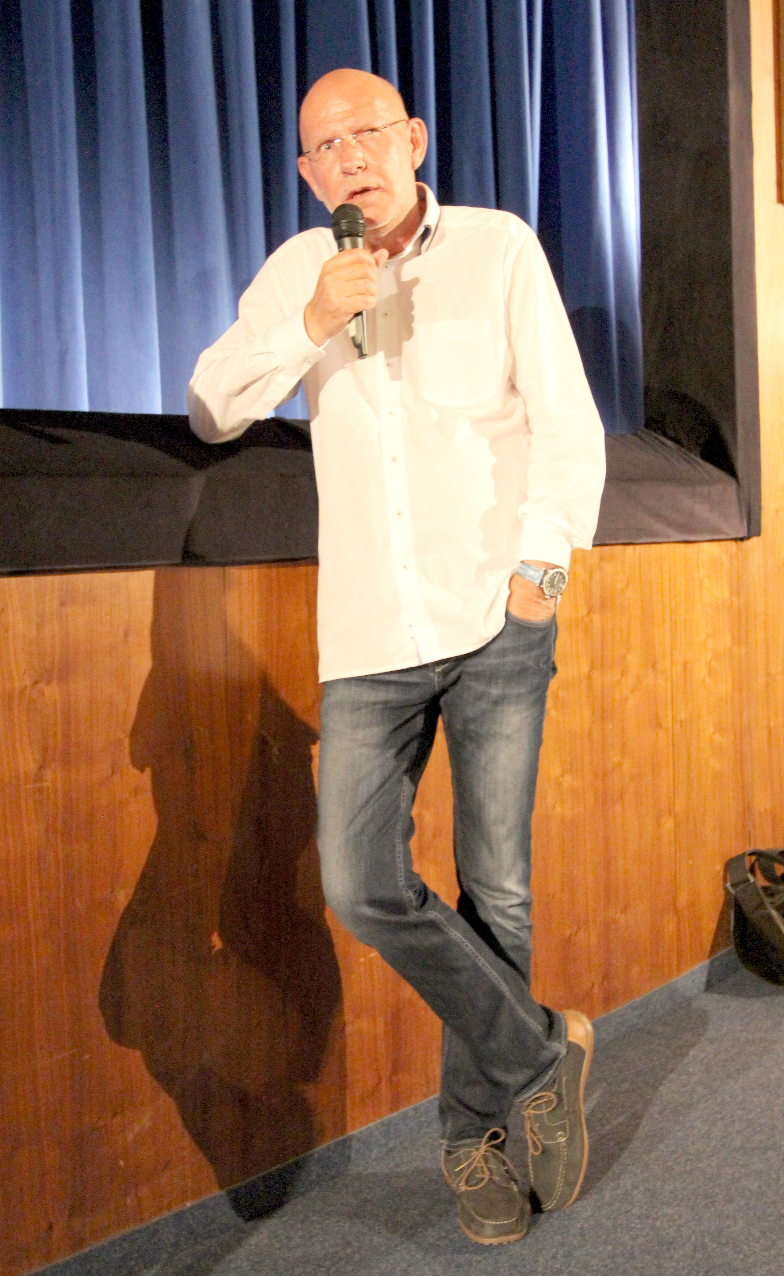 Christian Krönes wurde am 2. November 1961 in Feldkirchen, Österreich, geboren. Er studierte Drehbuch und Dramaturgie an der Universität für Musik und darstellende Kunst in Wien. Krönes ist Gründer, Chefproduzent und CEO von Blackbox Film & Media. Aufnahme von 2018.